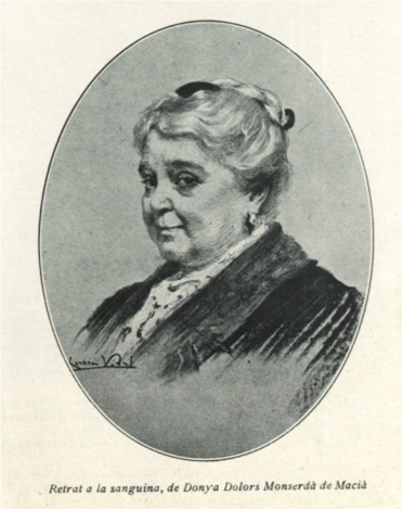 Sanguina de Lluïsa Vidal de Dolors Monserdà. Publicat a la revista Feminal al juny de 1914